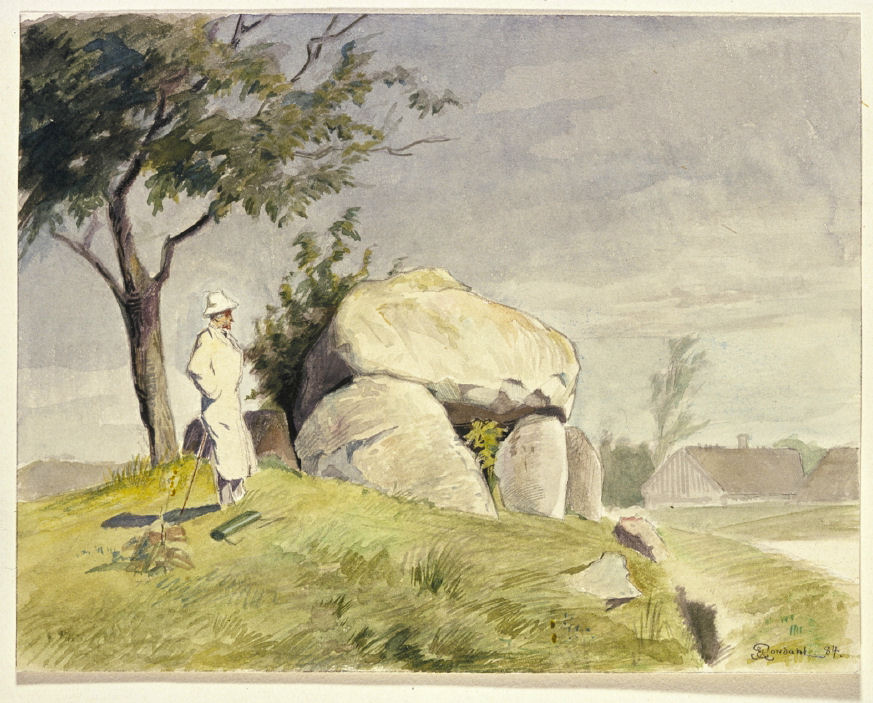 Akvarel af J. Kornerup 1864. Dysser. Langdysse ved Kirkerup, sb 4, Sømme Herred, Københavns Amt.